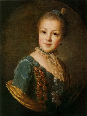 Евдокия Борисовна Юсупова (1744—1780), вторая жена Петра Бирона, герцога Курляндского и Семигальского. С 1777 года — кавалерственная дама ордена св. Екатерины Большого креста.